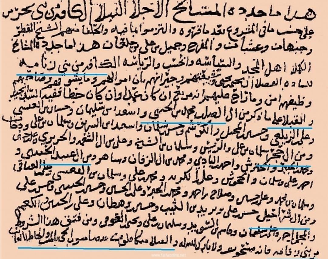 مخطوطة قديمة توضح نسب آل شراحيل إلى قبائل فيفاء